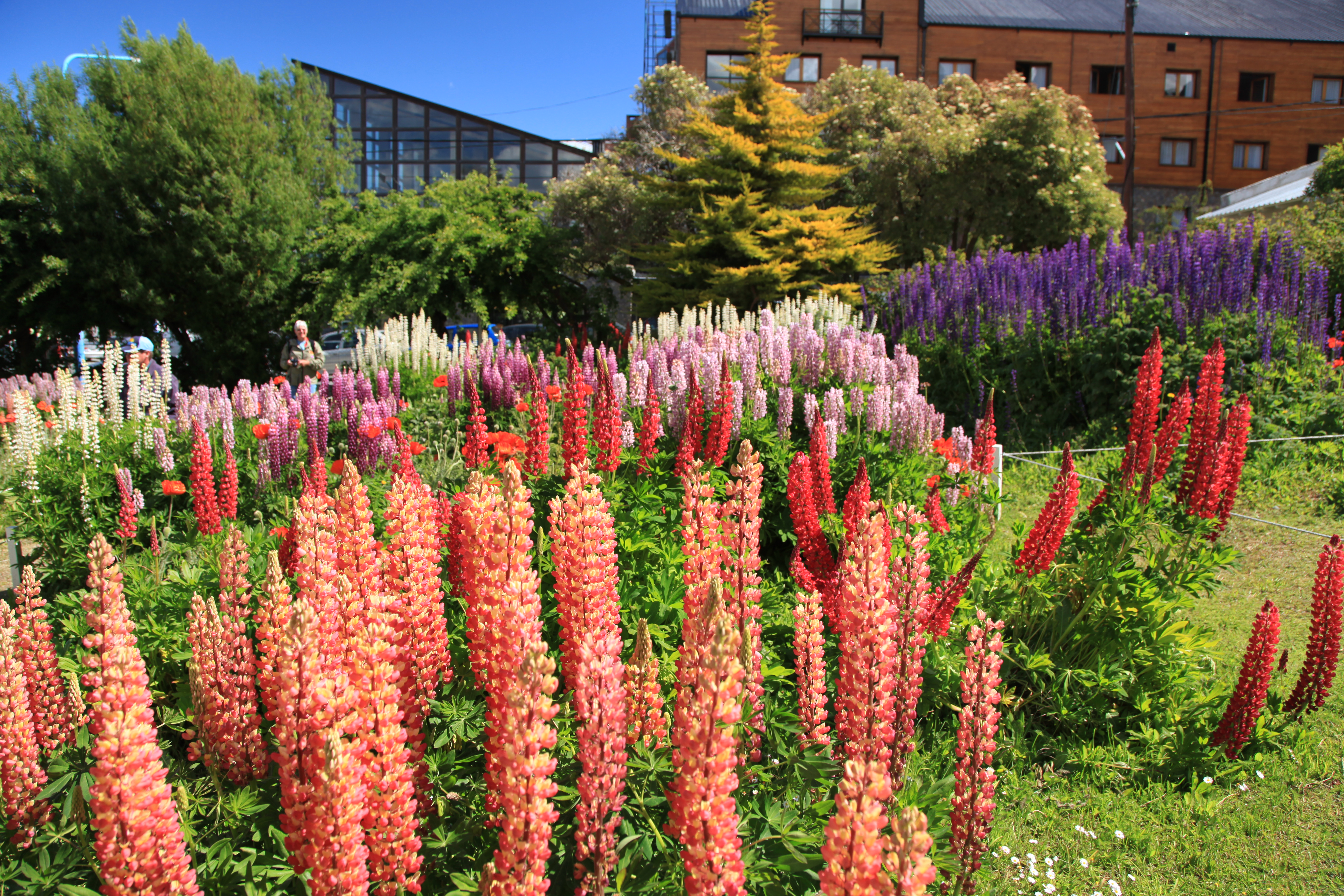 Beside the Museo del Fin del Mundo.